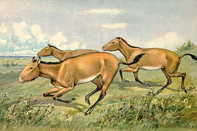 Hipparion